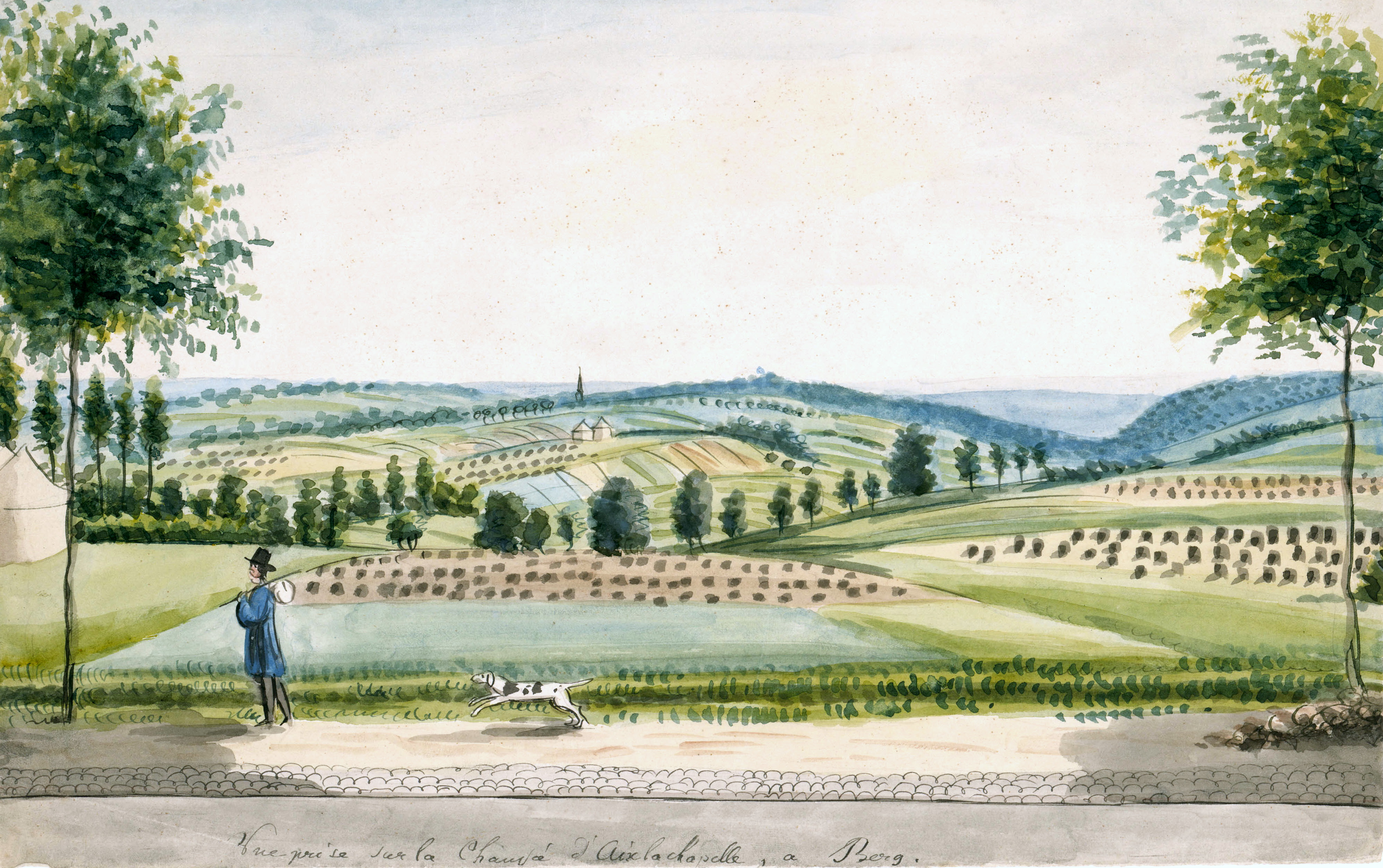 Ingekleurde tekening van Philippe van Gulpen van het uitzicht op de kerktoren van Sint-Geertruid vanaf de rijksweg Maastricht-Aken nabij het gehucht Berg (Cadier en Keer). De steenweg naar Aken werd tussen 1823 en 1828 aangelegd. Bijschrift: Vue prise sur la Chaussée d’Aix la Chapelle, à Berg. Collectie Van der Noordaa in het RHCL, Maastricht, CVDN 311.